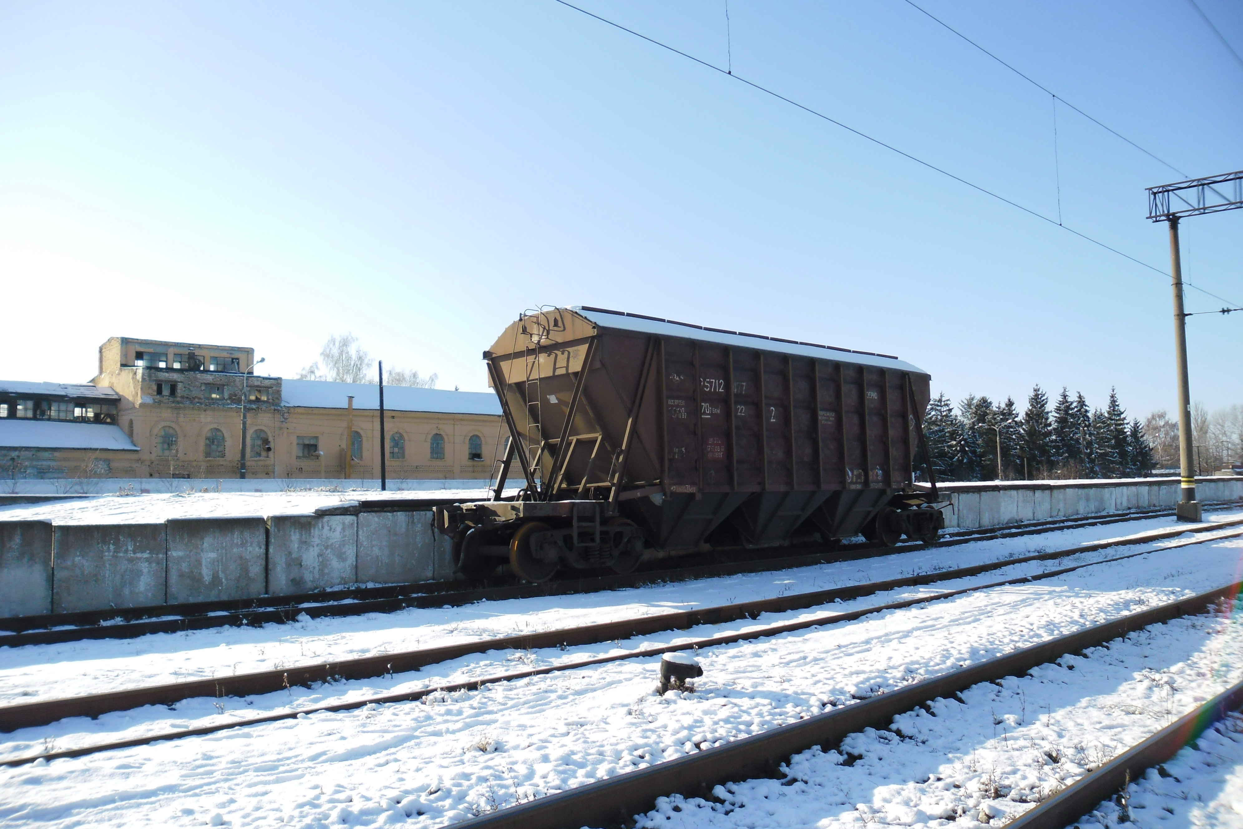 Вантажний вгаон